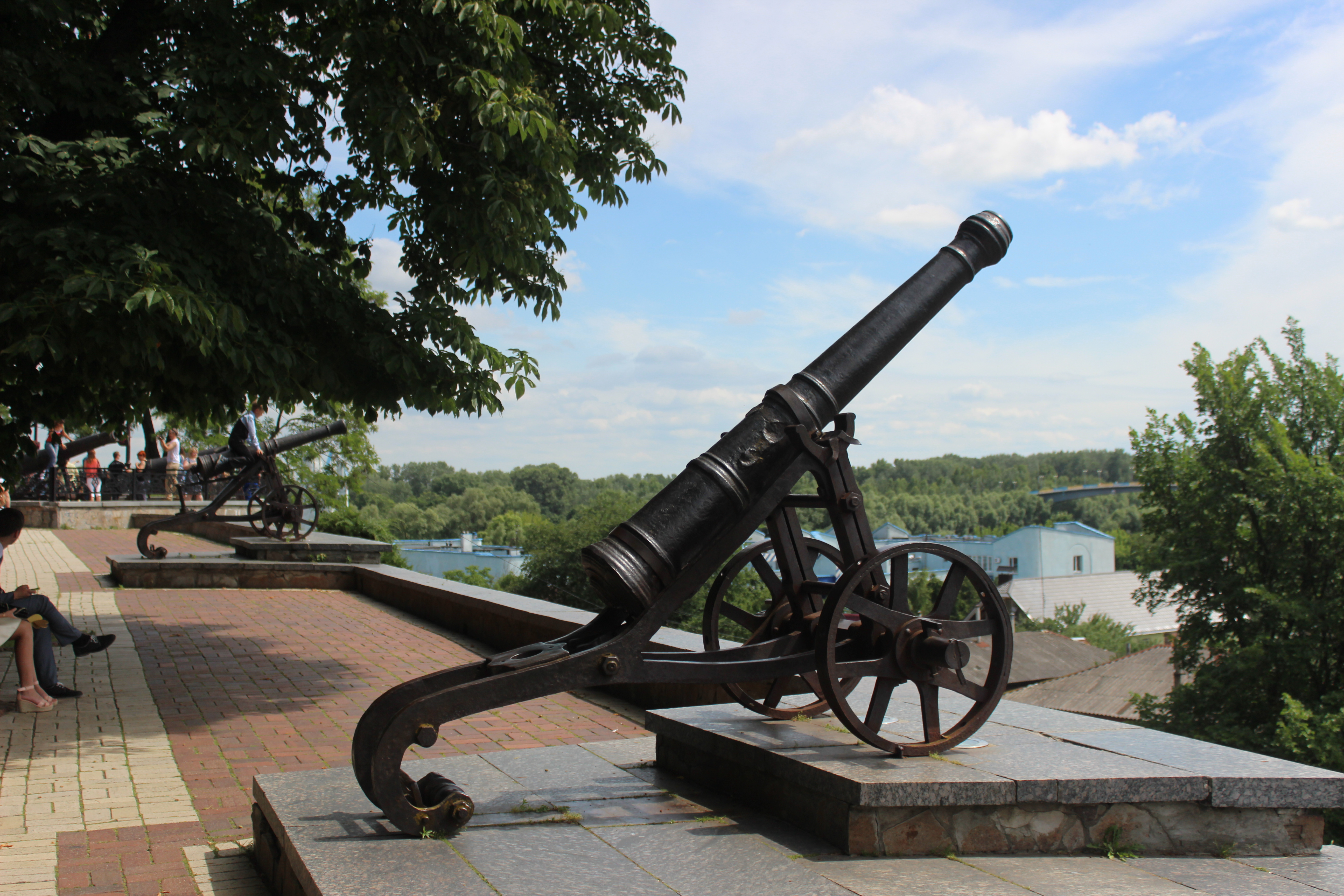 Гармати з бастіонів Чернігівської фортеці, Чернігів, територія Валу